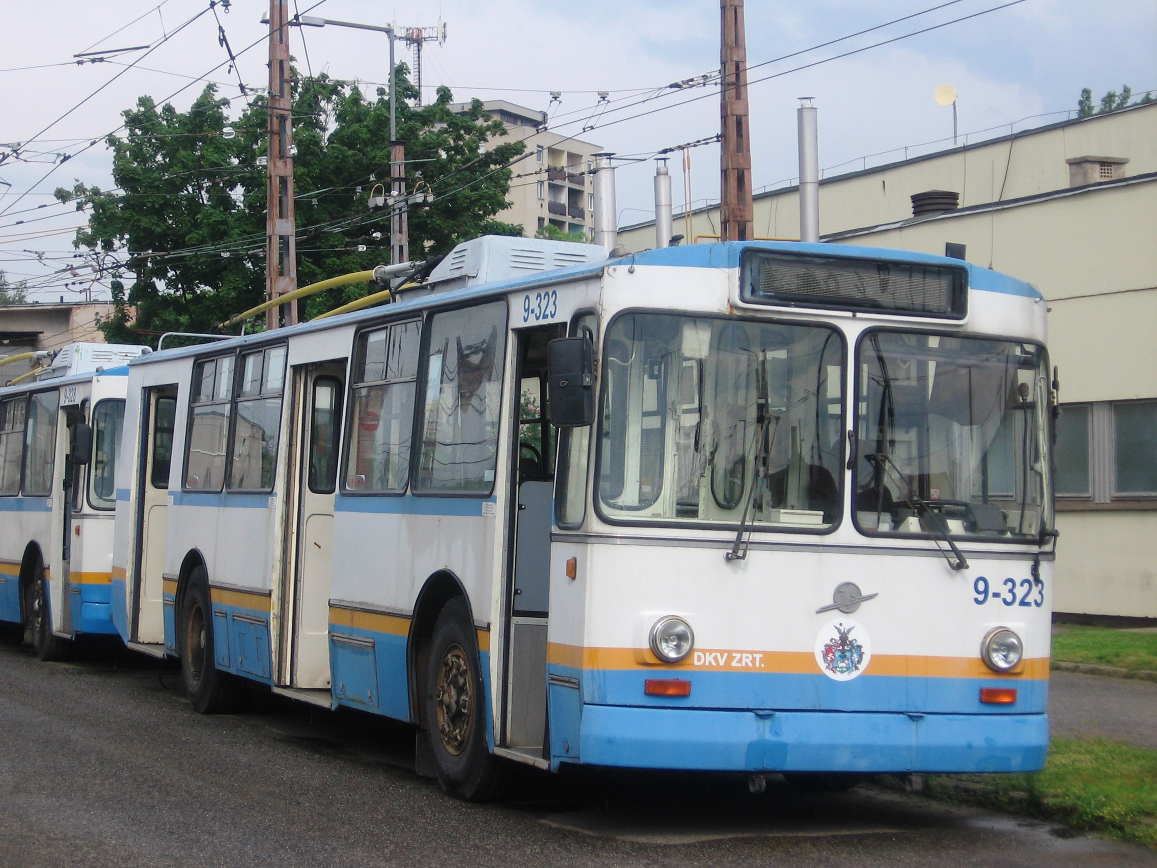 Psz: 323. Üzemképes, de forgalomba alig adják.